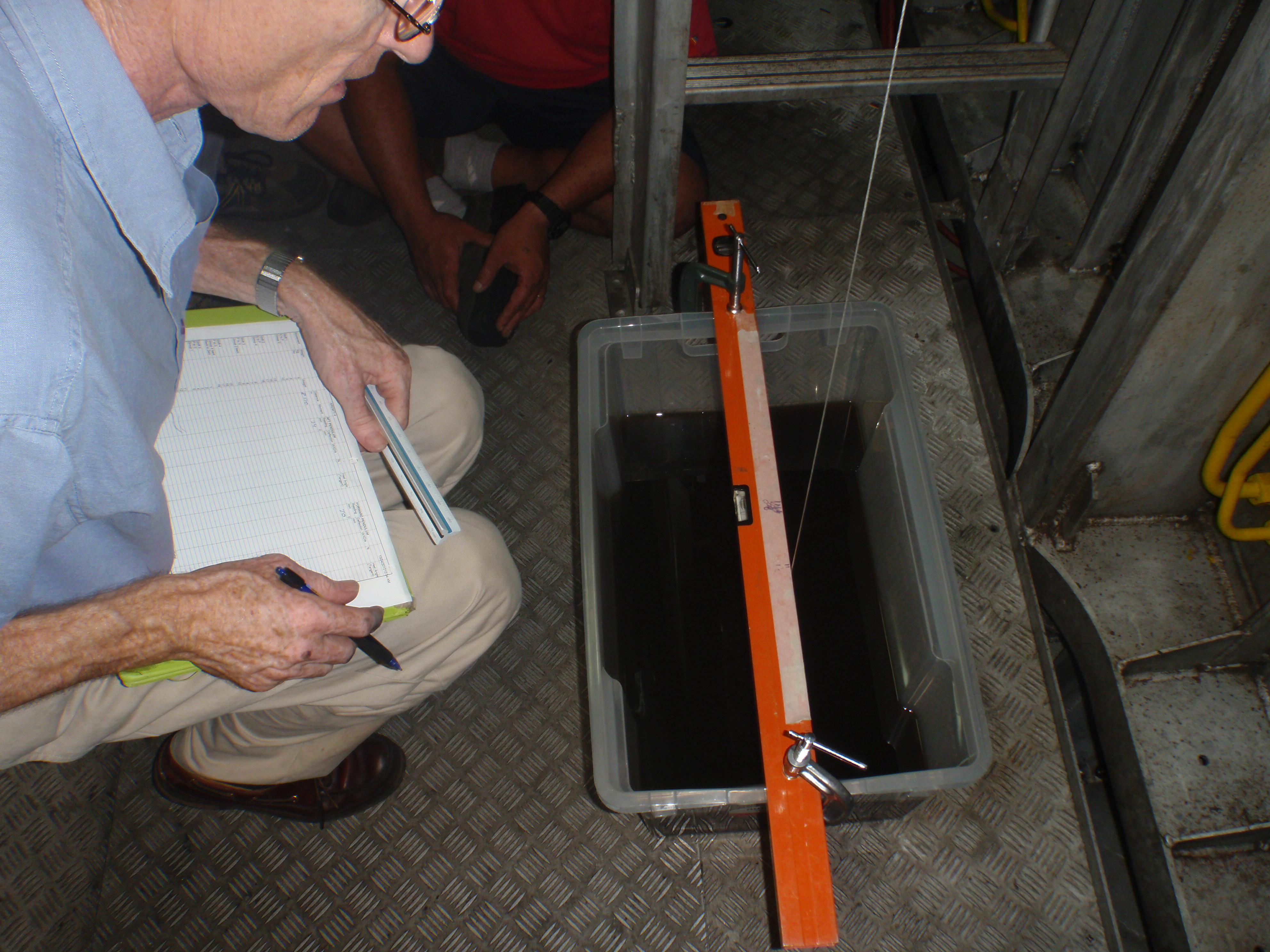 Un architecte naval mesurant le deplacement transversal du pendule lors d'une experience de stabilité